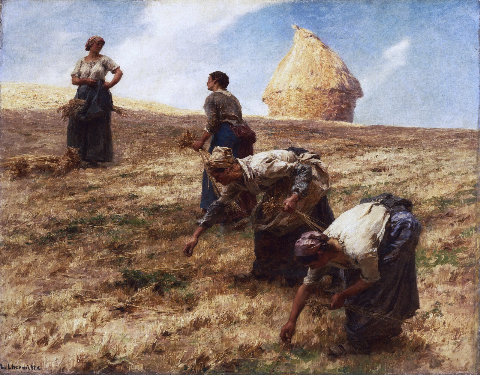 Les Glaneurs